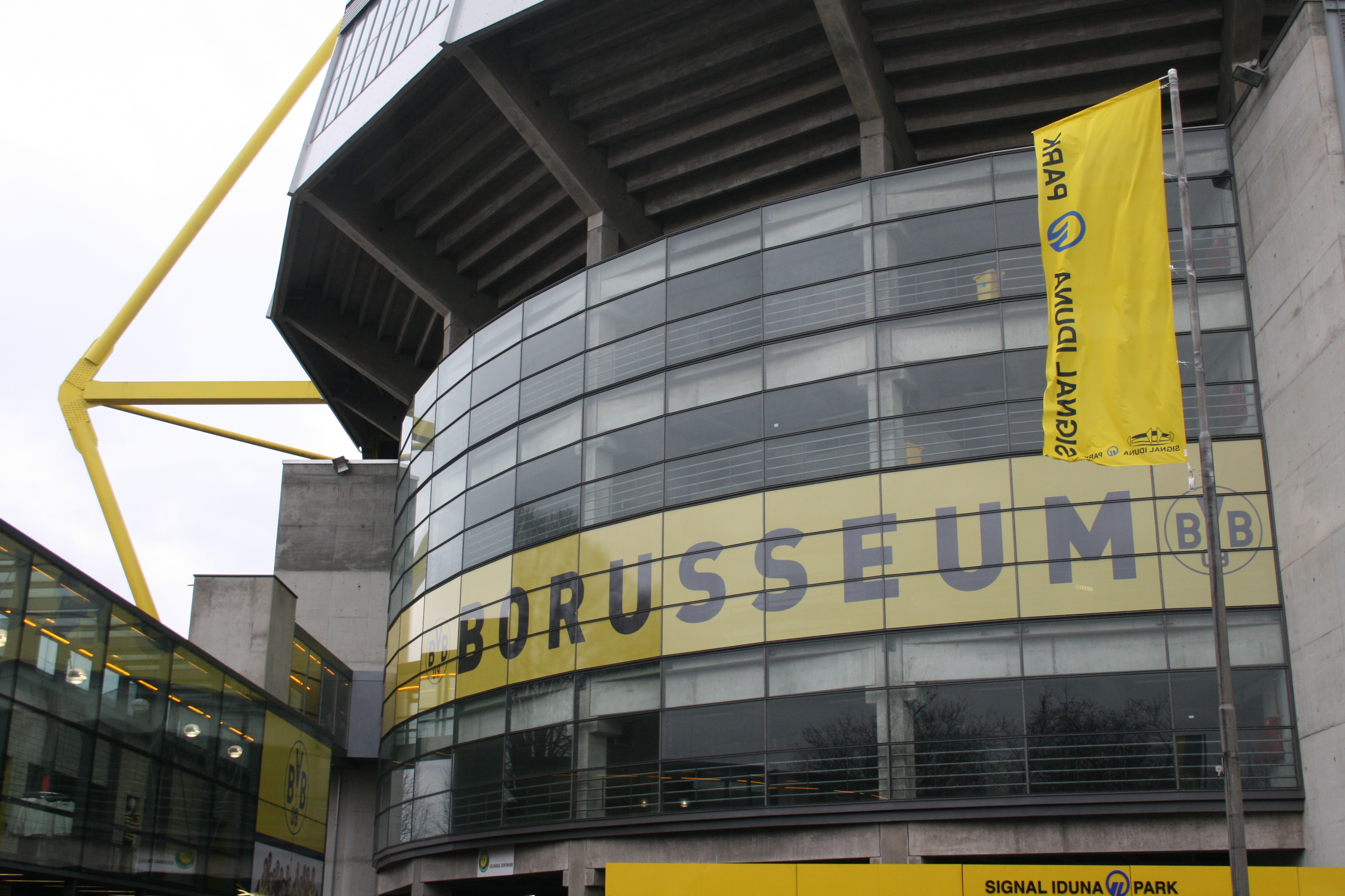 Das Borusseum - Museum des BVB Borussia Dortmund im Westfalenstadion